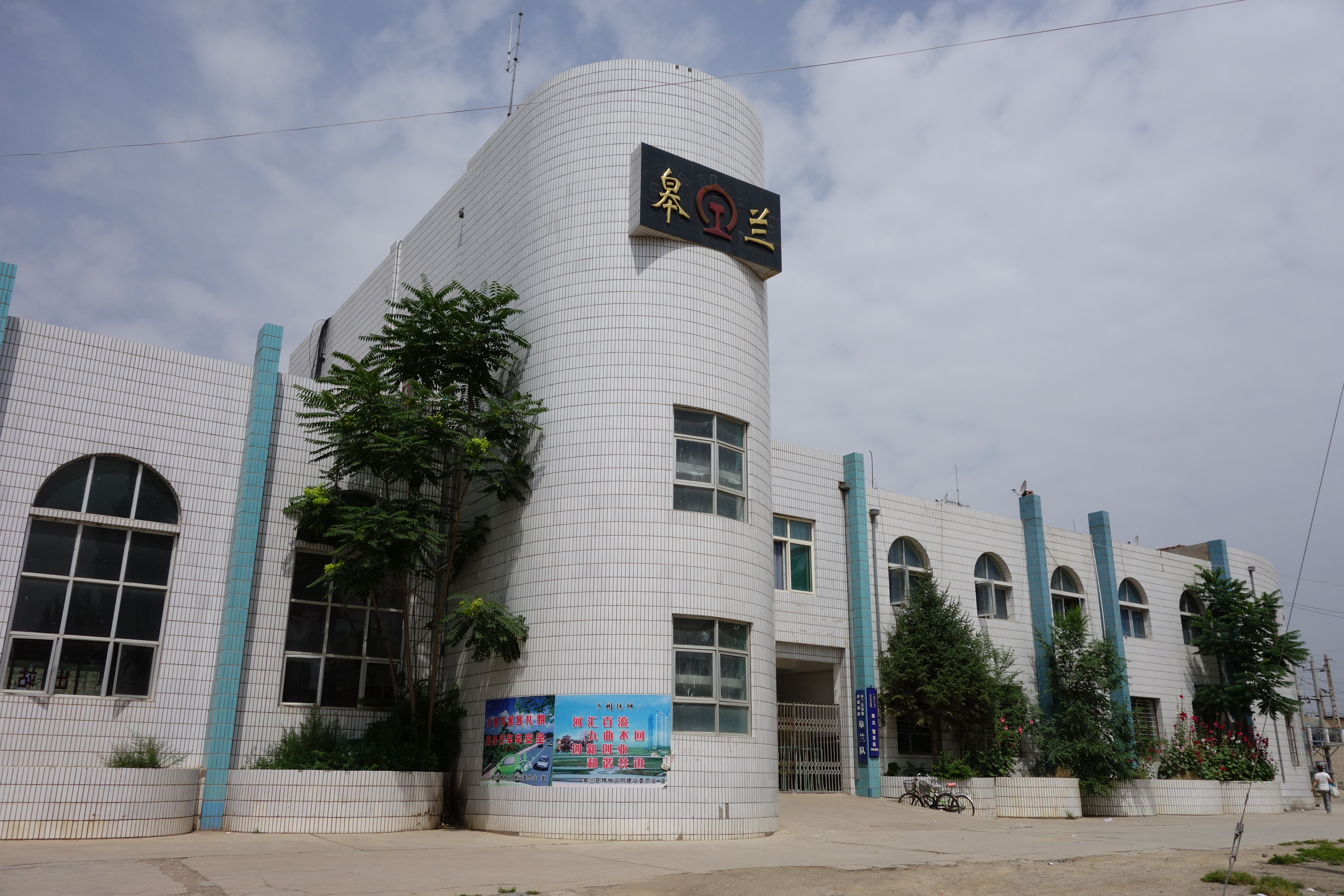 甘肃省皋兰站